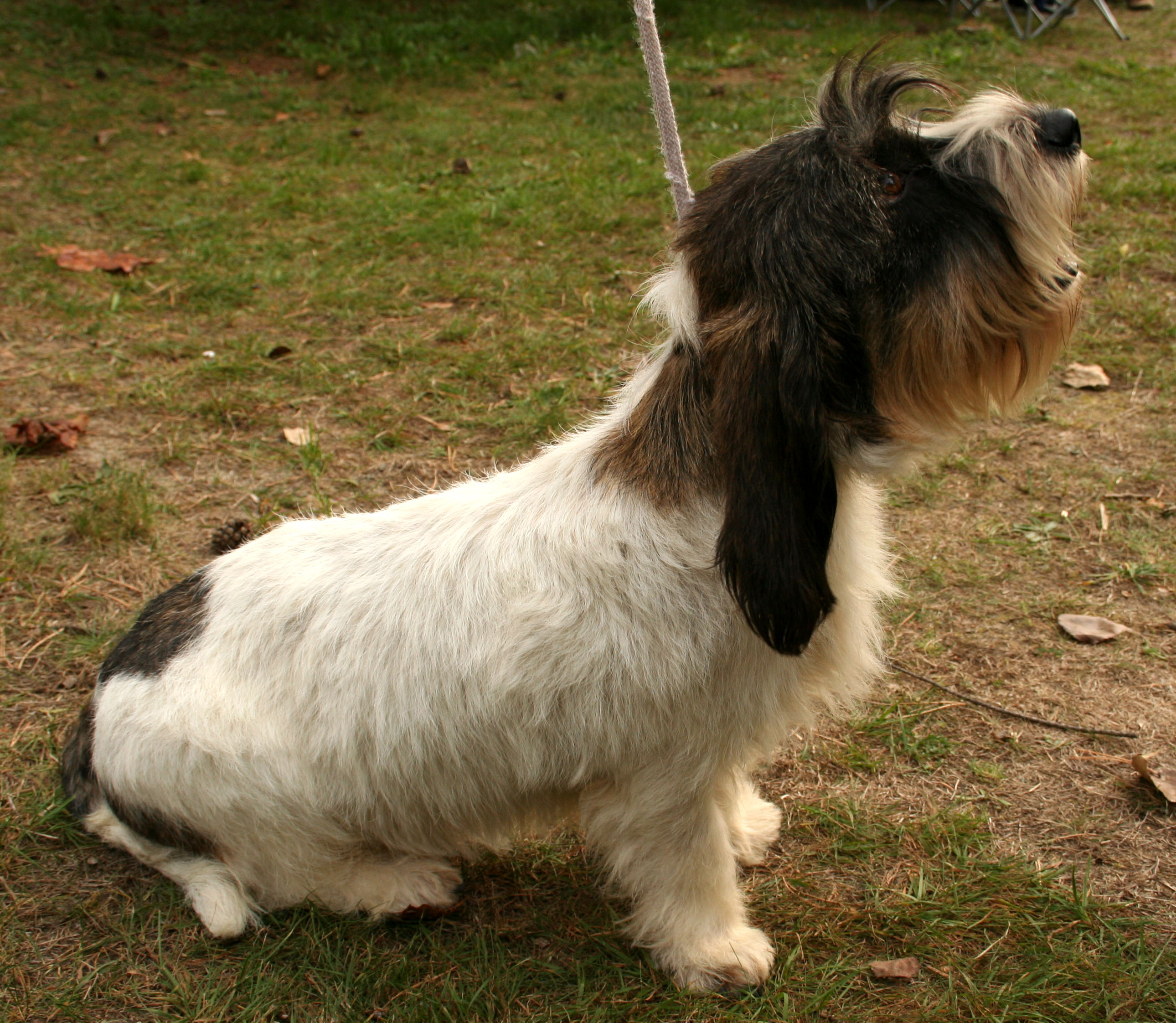 Petit_basset_grifon_vendeen na krajowej wystawie w Rybniku - Kamieniu